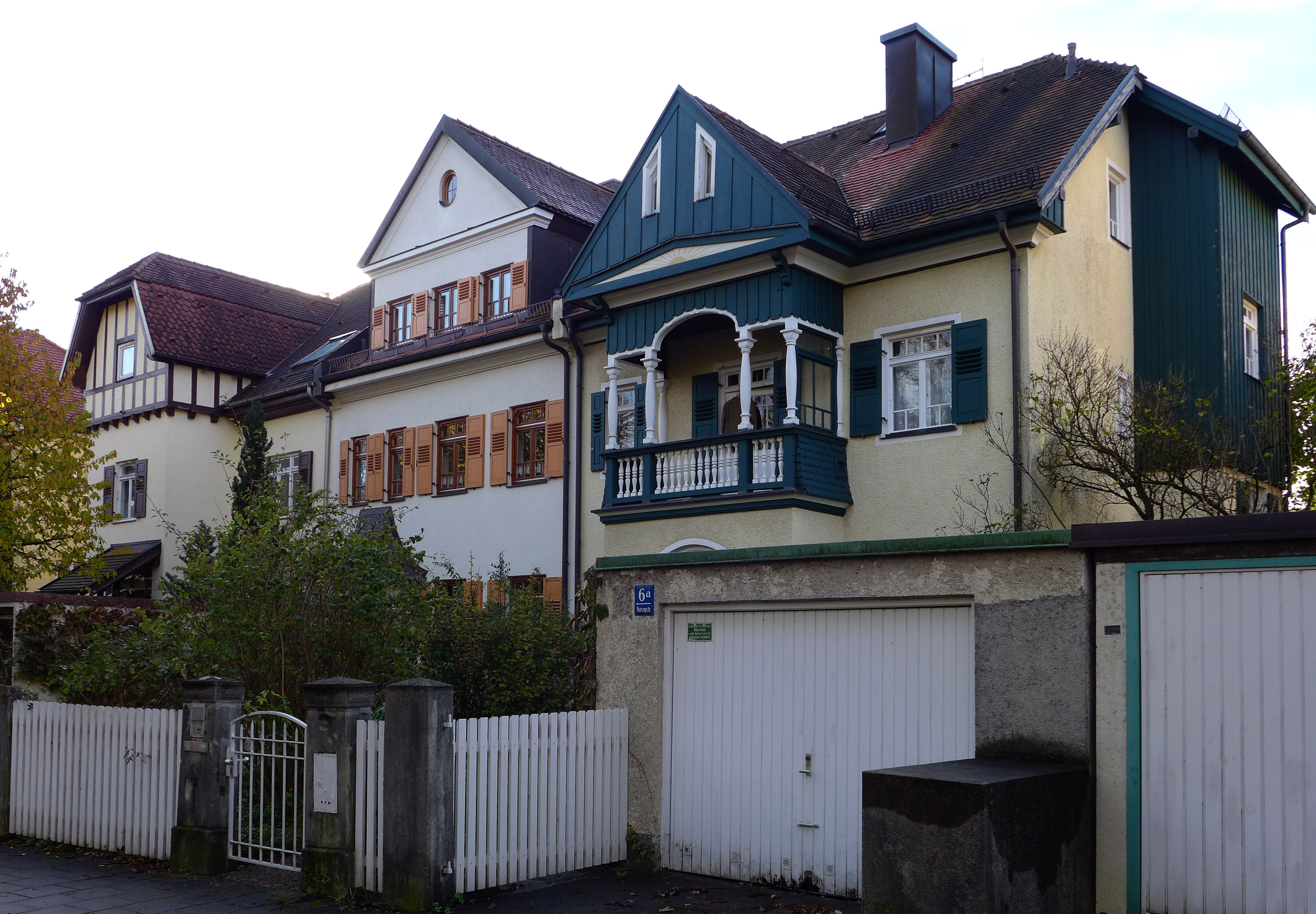 Marsopstr 6abc, München